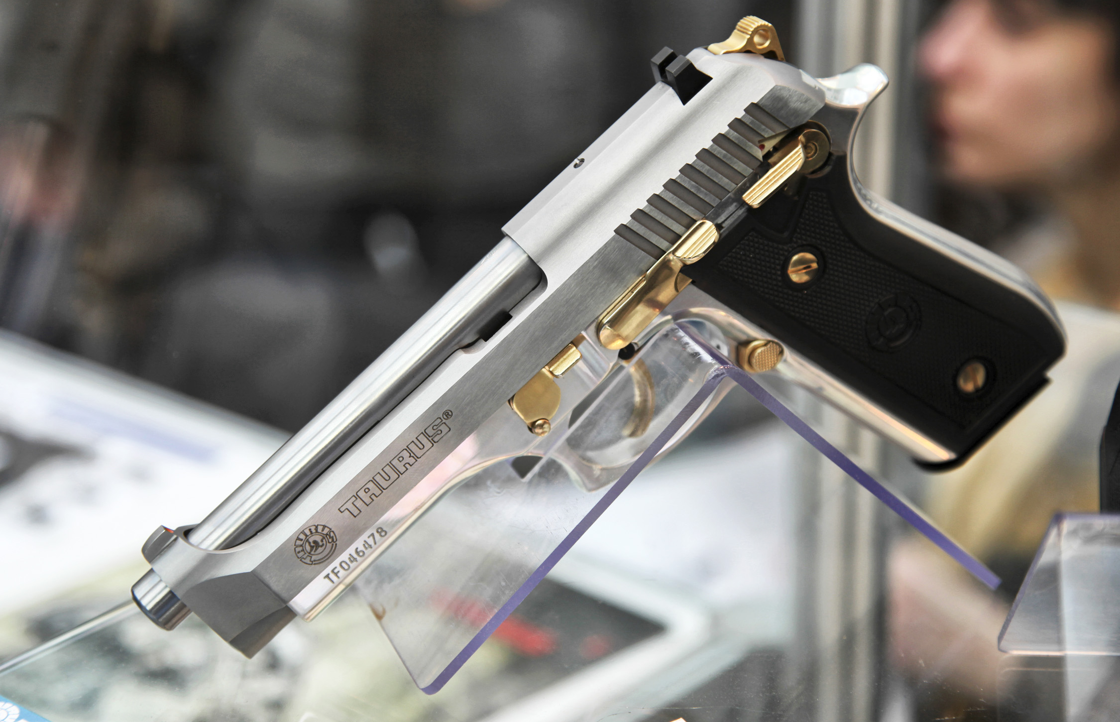 9x19 Taurus PT92